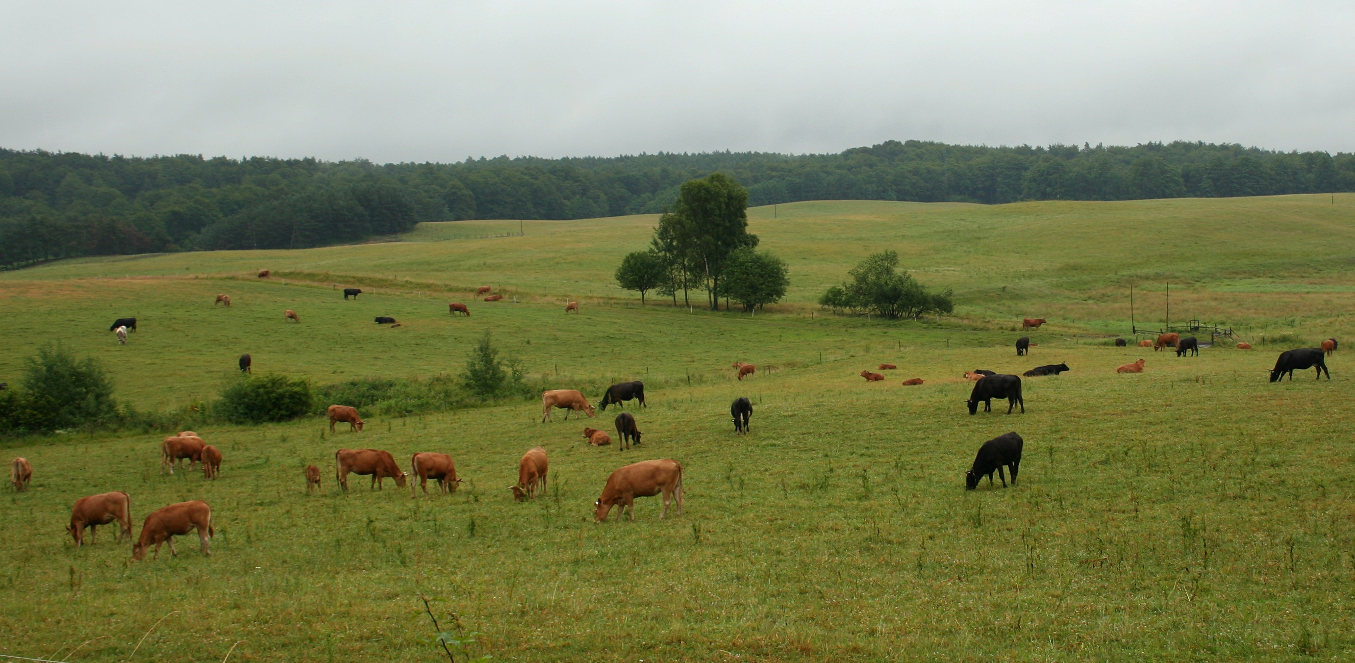 Pastwisko przy drodze z miejscoowści Jasień do wsi Rokity, gmina Czarna Dąbrówka, powiat bytowski